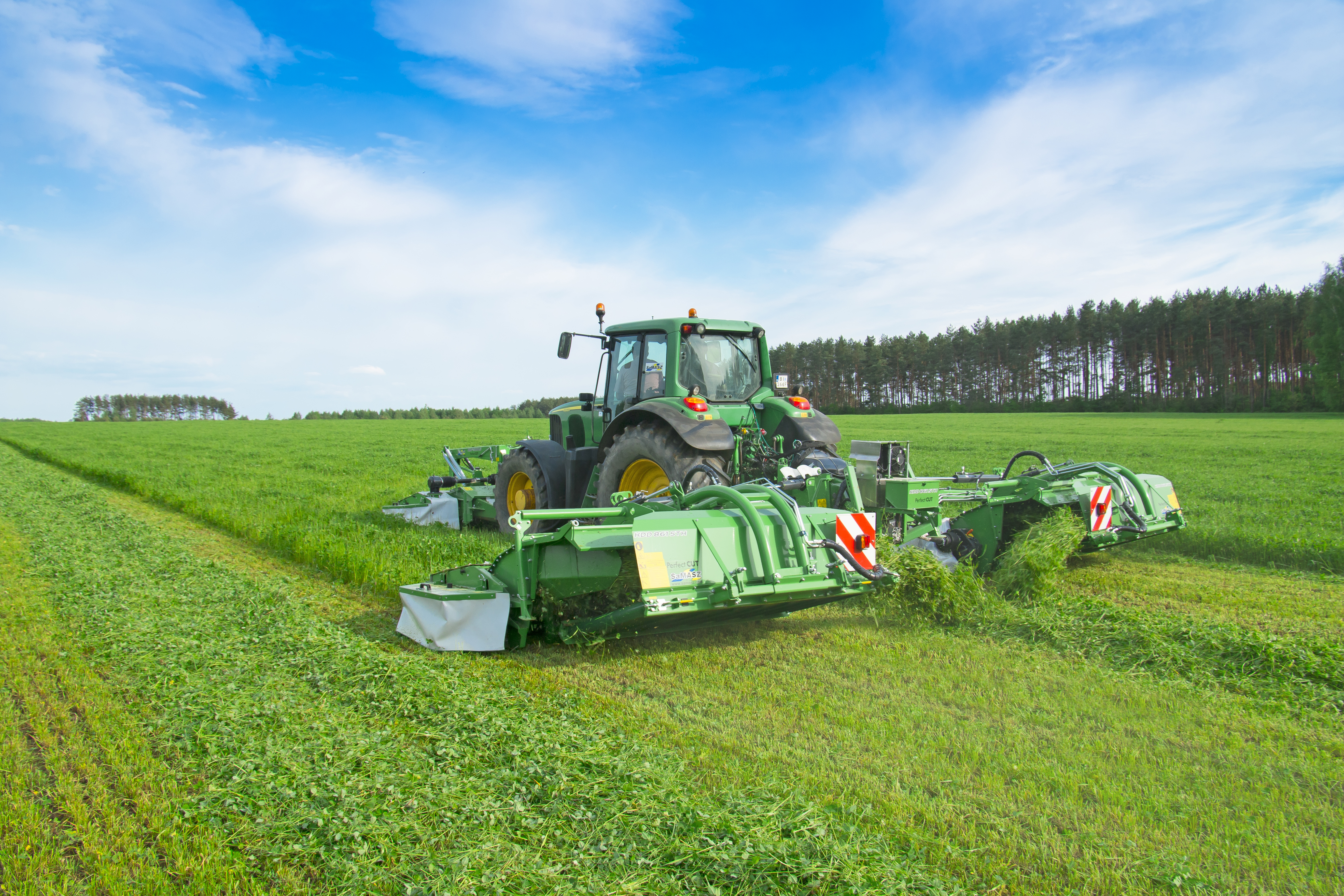 Sztandarowy zestaw kosiarek dyskowych SaMASZ - GigaCUT o szerokości roboczej 8,6 m.